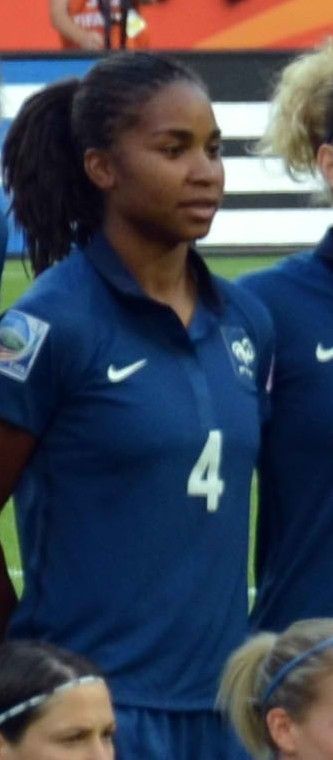 Laura Georges - Match de phase de groupes de la coupe du monde entre la France et l'Allemagne le 5 juillet 2011 au Borussiapark de Mönchengladbach